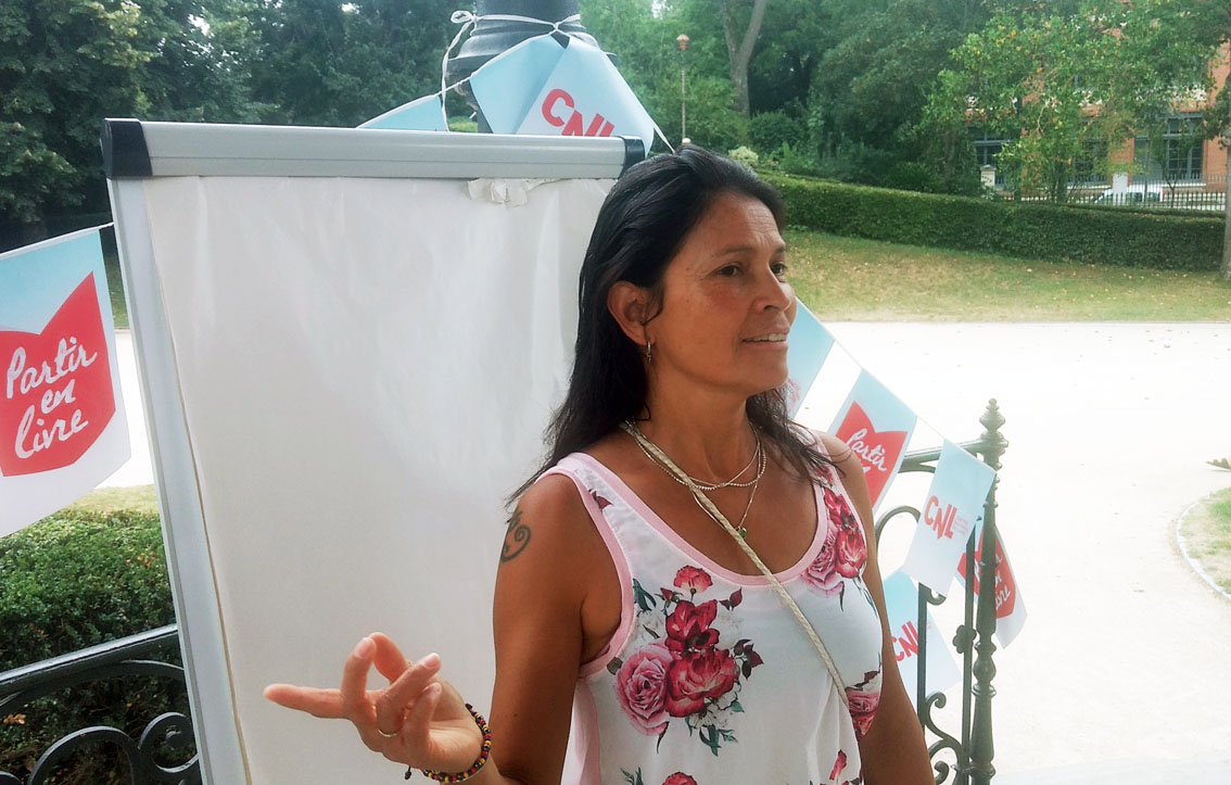 Conférence Isabel